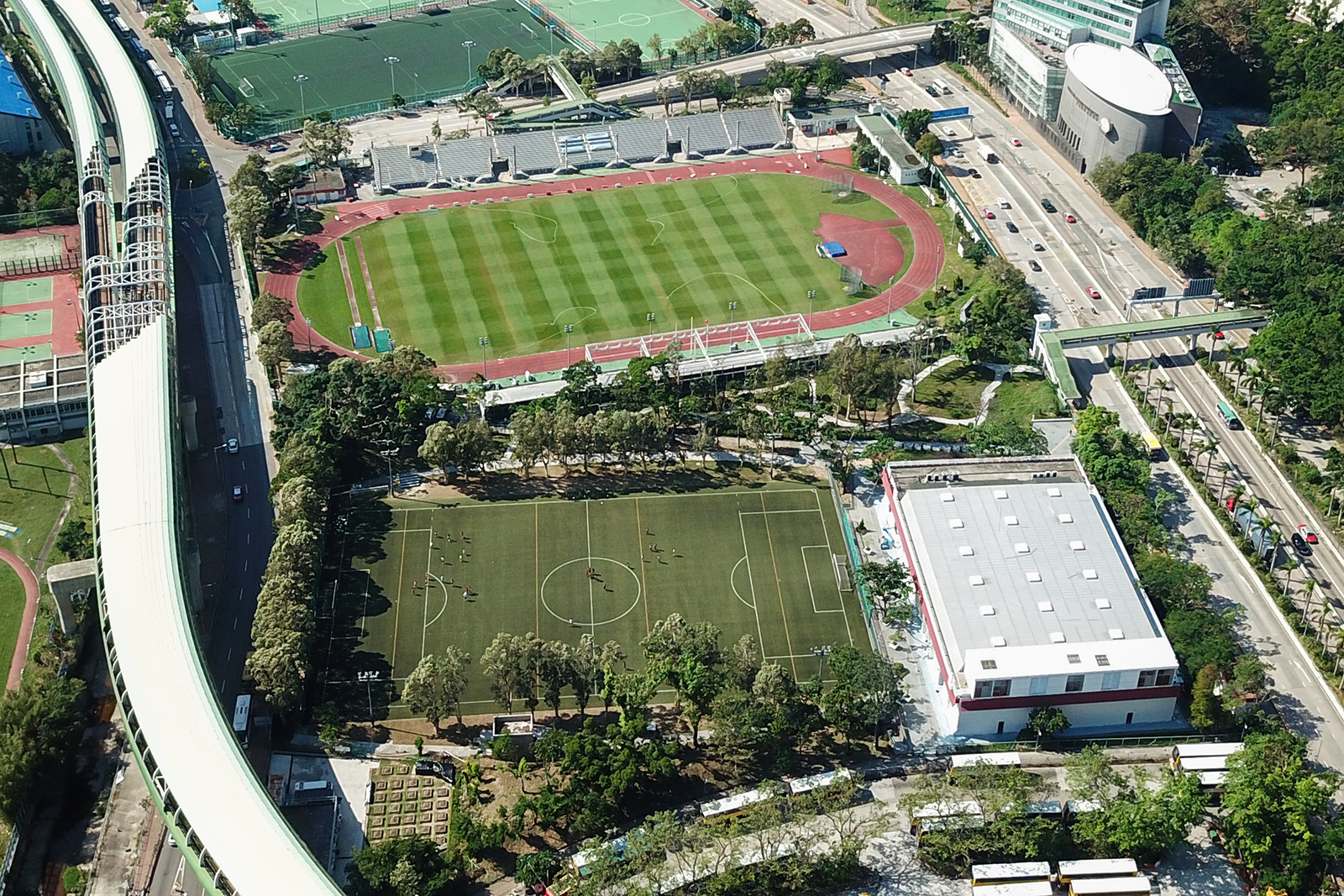 Aberdeen Sports Ground aerial view